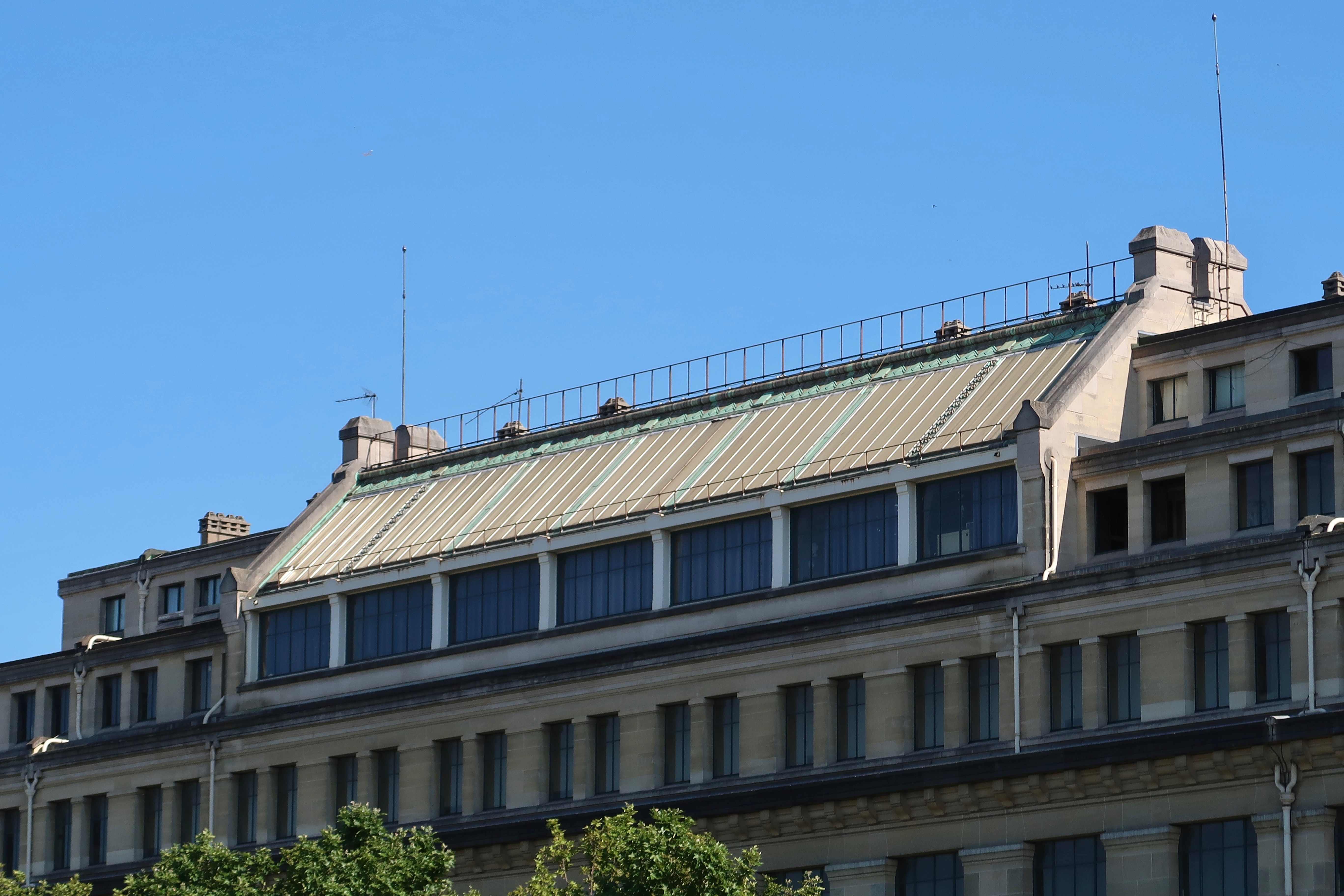 Lycée Jean-de-La-Fontaine (Paris, 16e).